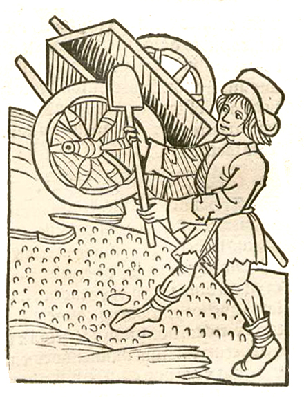 Abbildung zum Kapitel Arena - Sand